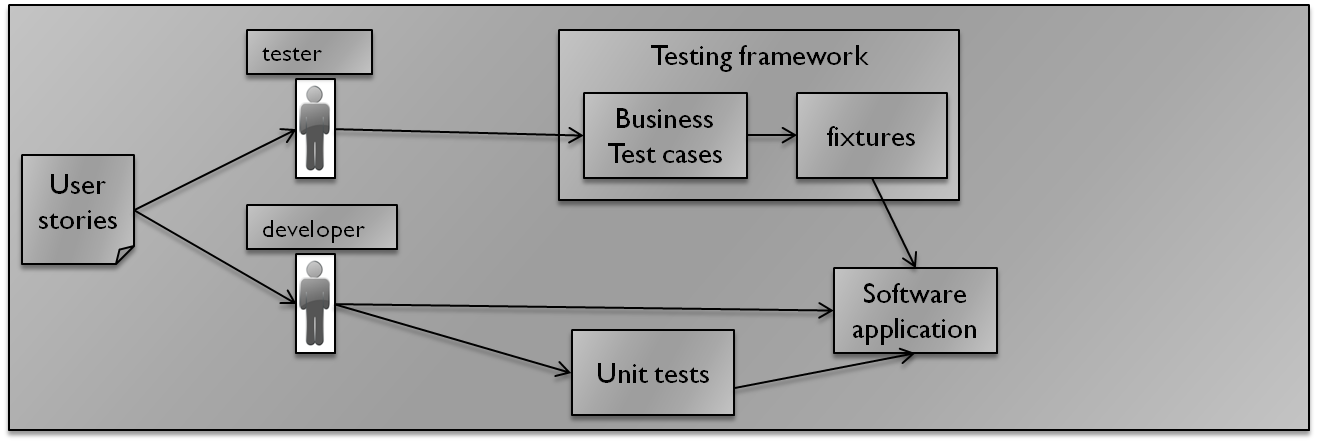 agile testing